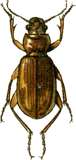 This file has been extracted from another file: Jacobs09.jpg